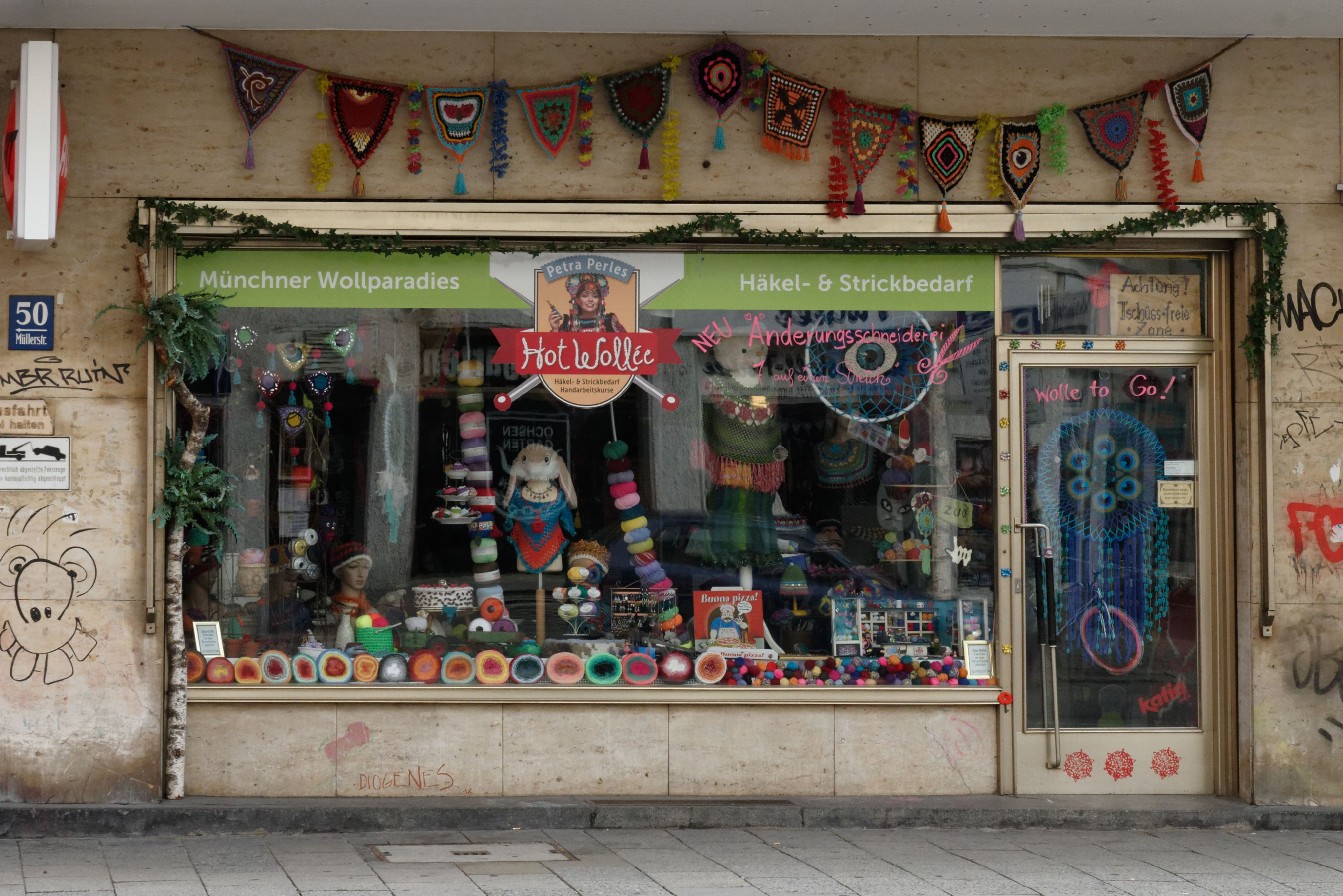 Wollladen "Hot Wollée" von Petra Perle